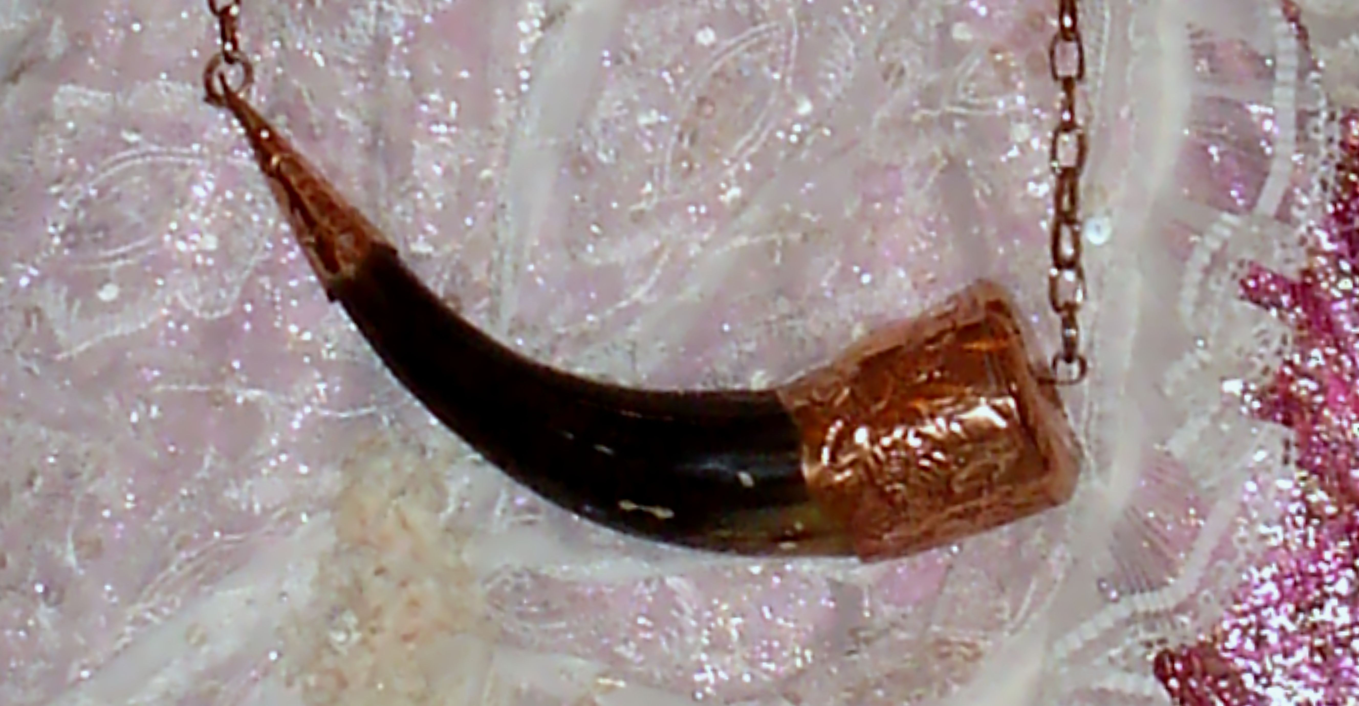 Chifre, também chamado de Oguê na cultura Afro